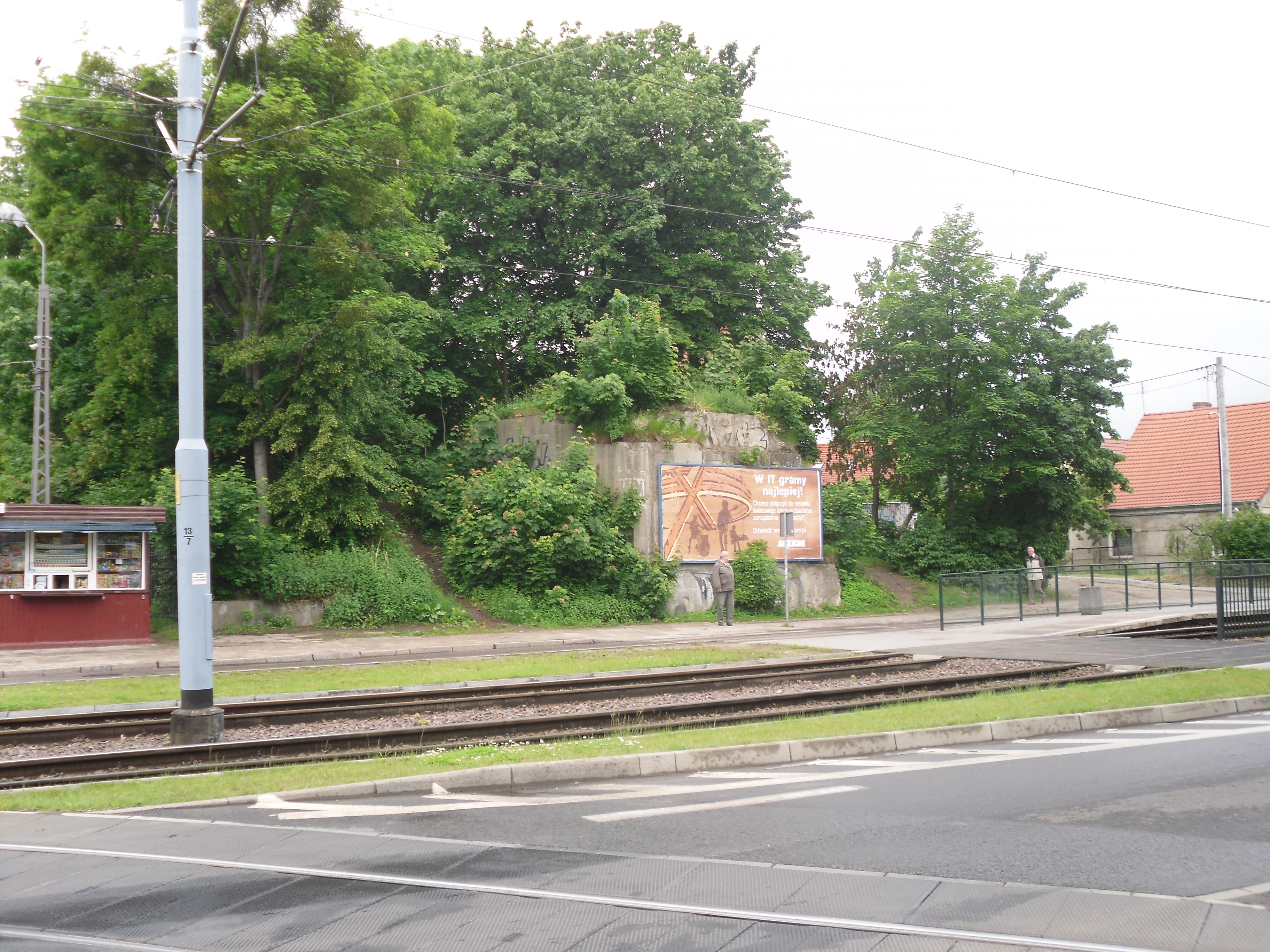 Gdańsk. Zachodni przyczółek wiaduktu linii Gdańsk Wrzeszcz-Stara Piła na ulicy Wita Stwosza.